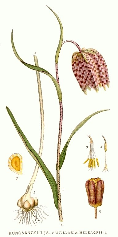 Fritillaria meleagris L. Original Description Kungsängslilja, Fritillaria meleagris L.